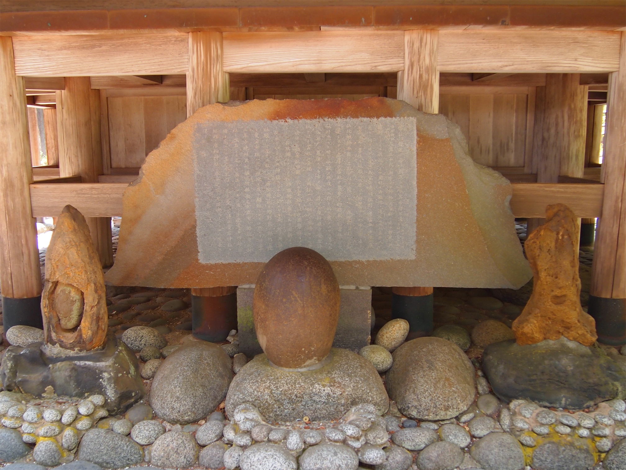 唐松山天日宮裏手にある直接参拝できる抱き石と由緒を記した石碑。抱き石は左から抱石男石、玉鉾石、女石。